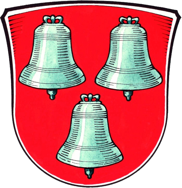 Wappen von Mörlenbach